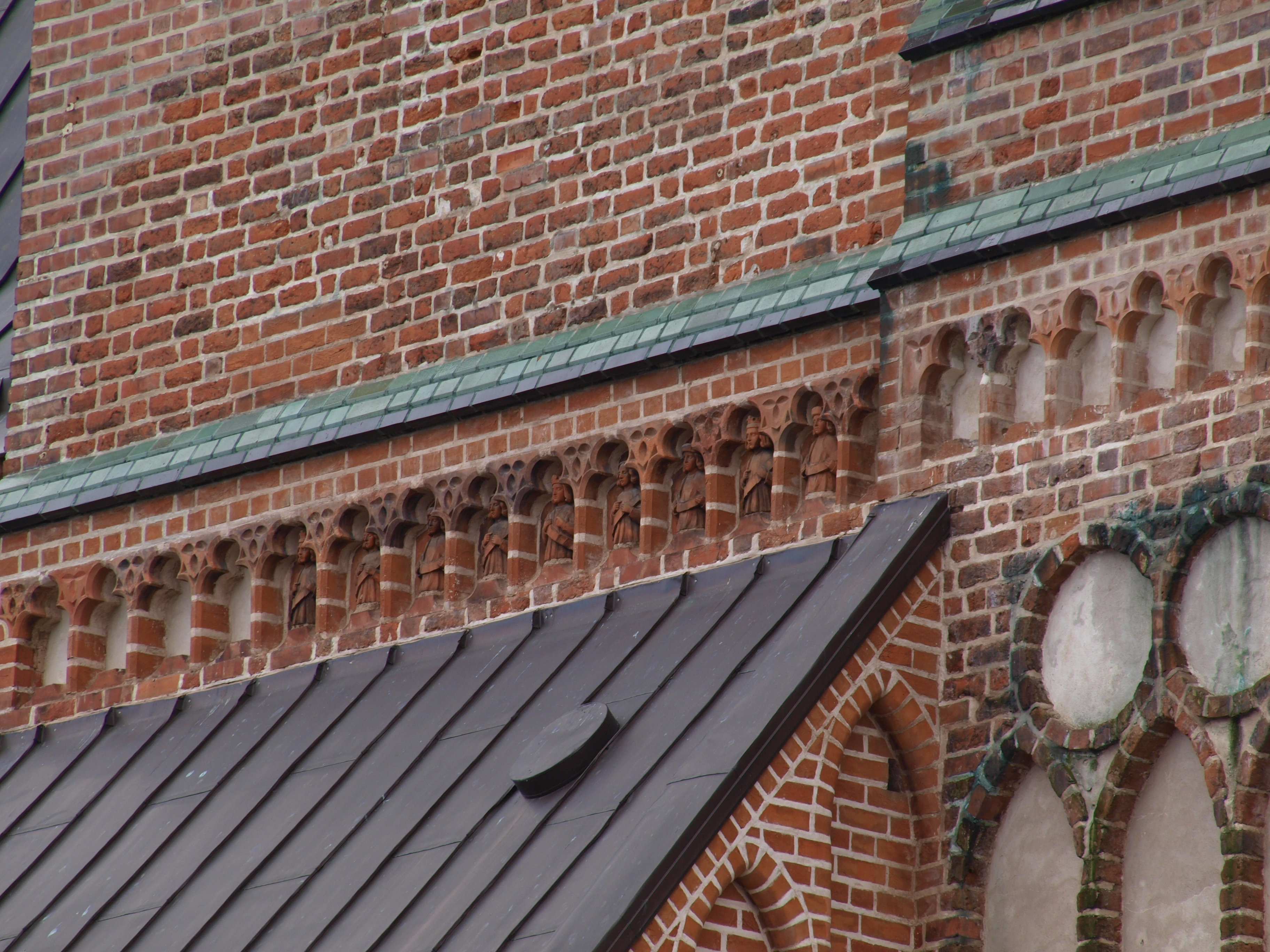 Tartu Jaani kirik, 14.saj. Terrakotakujud.